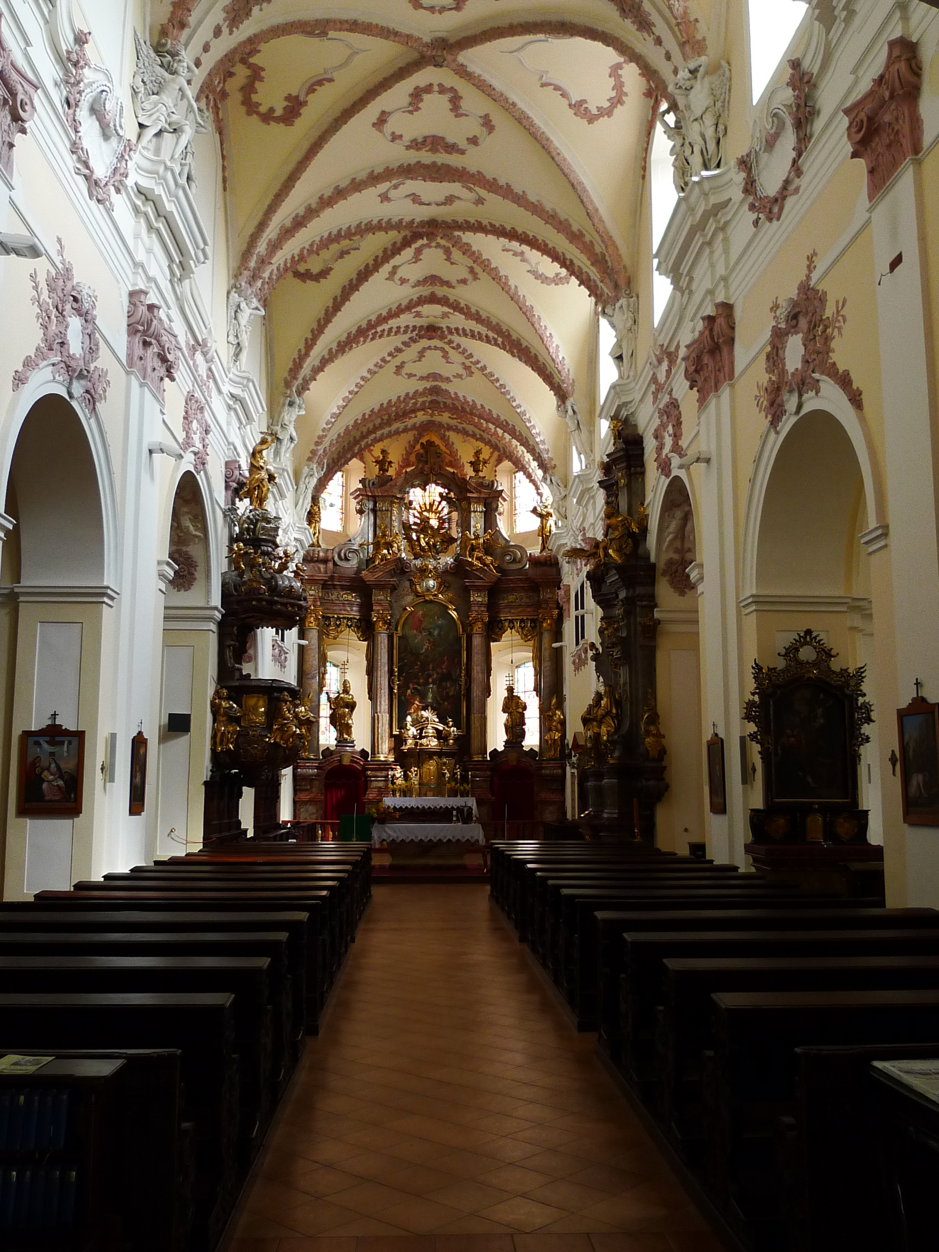 Kostel Všech svatých, Dlouhá čp. 196, Litoměřice-Město, Litoměřice.